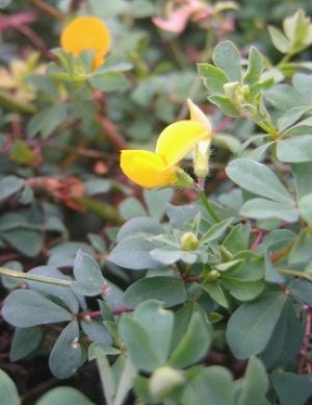 Lotus corniculatus var. japonicus